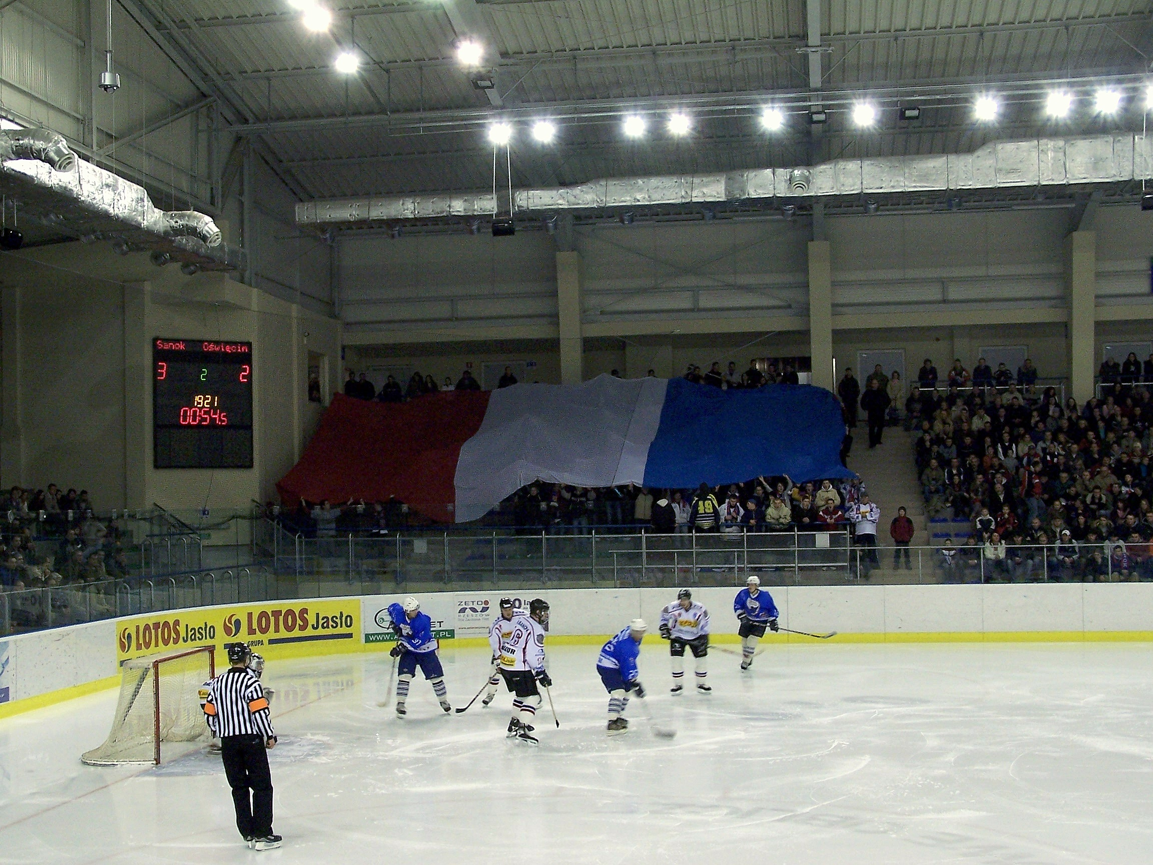 Flaga kibiców KH Sanok podczas meczu KH Sanok - Unia Oświęcim (6:2) 14 stycznia 2007.